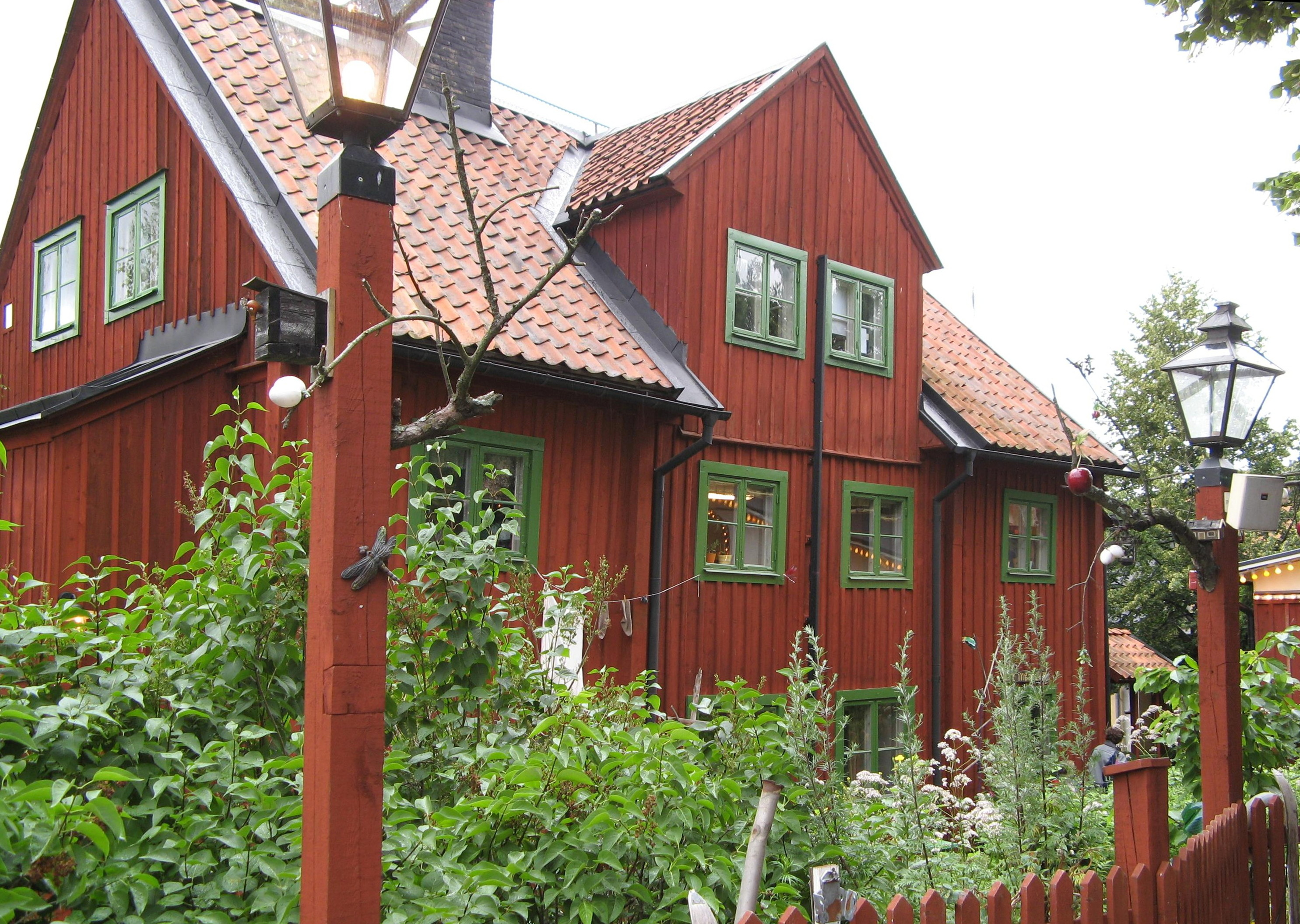 Petterson and Findus' House, Gröna Lund, Stockholm